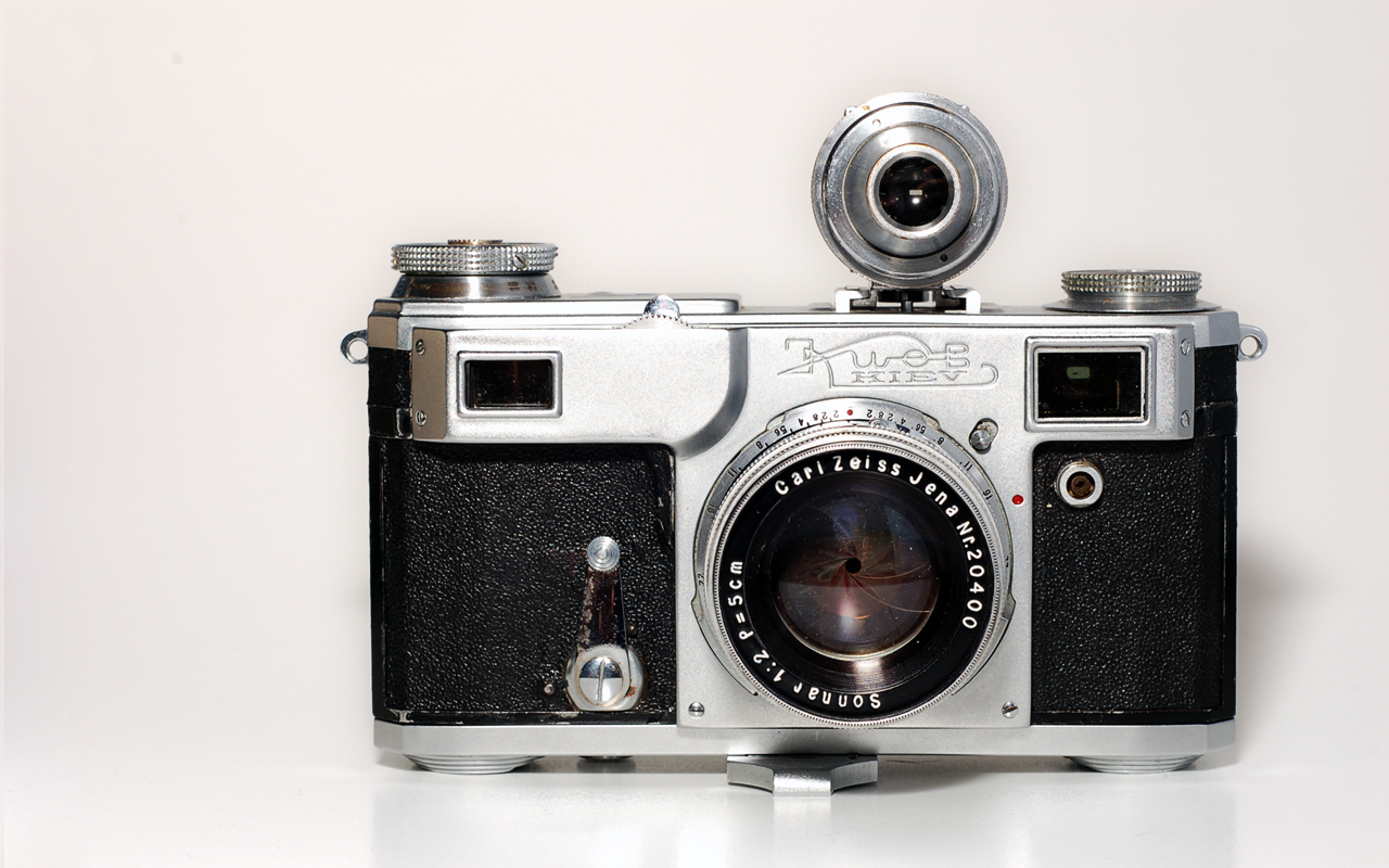 Вероятно, на фотографии изображен «Киев-2А» (1956—1958). Имеется синхроконтакт и откидная пластина снизу для более устойчивой установки фотоаппарата на столе.